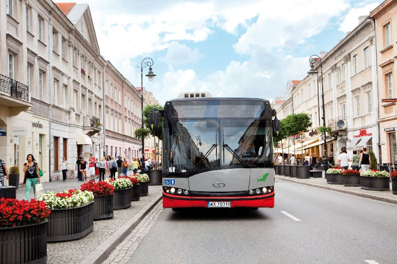 18 Hybrid Allison